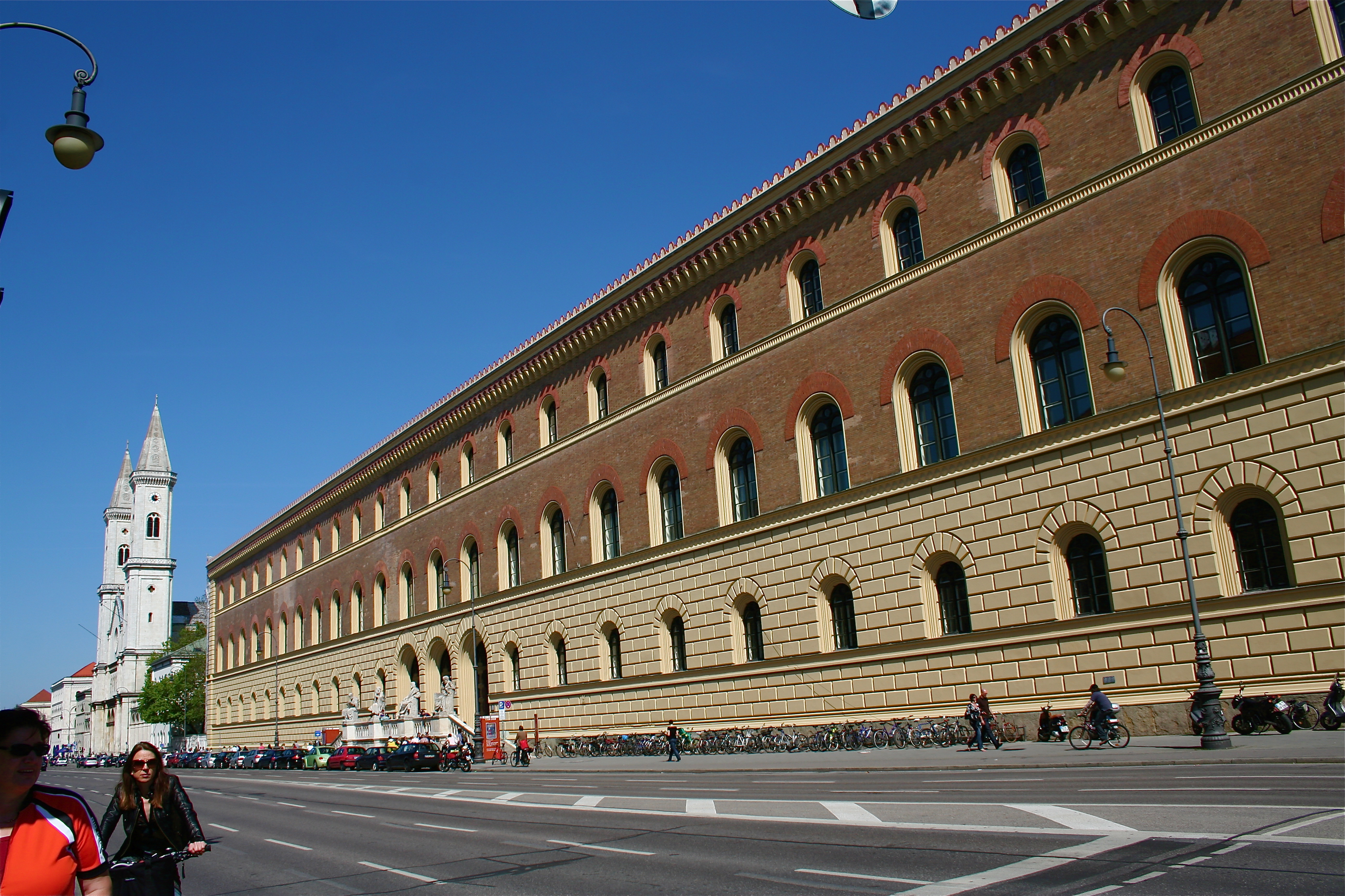 Bayrische Staatsbibliothek nach Restaurierung